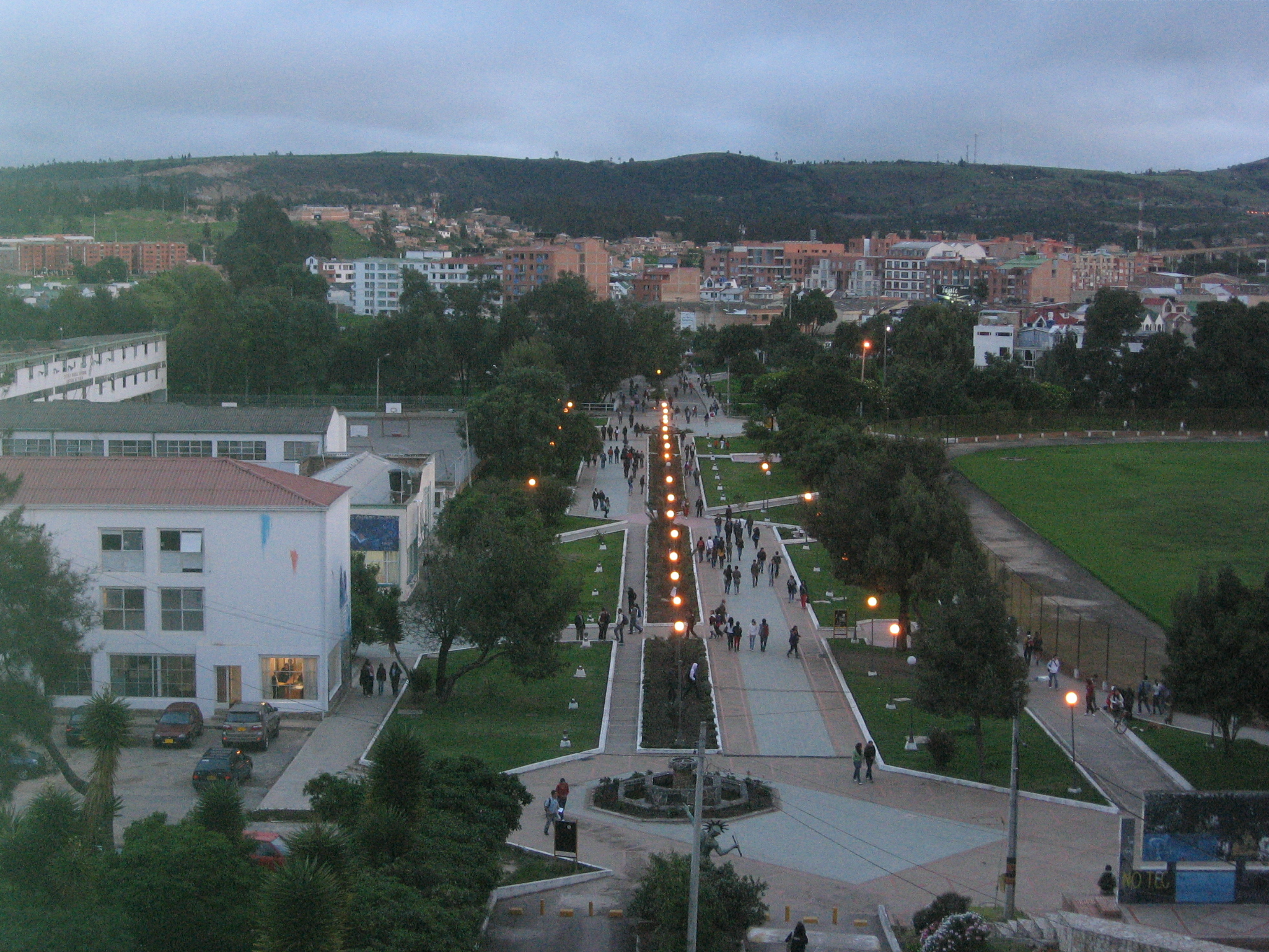 Vista Panoramica U.P.T.C Sede Central Tunja